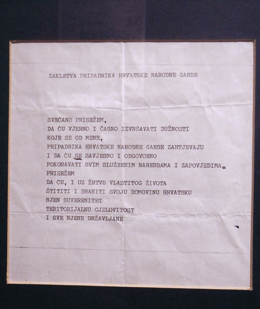 Izložba Domovinski rat u Hrvatskom povjesnom muzeju tijekom Noći muzeja.